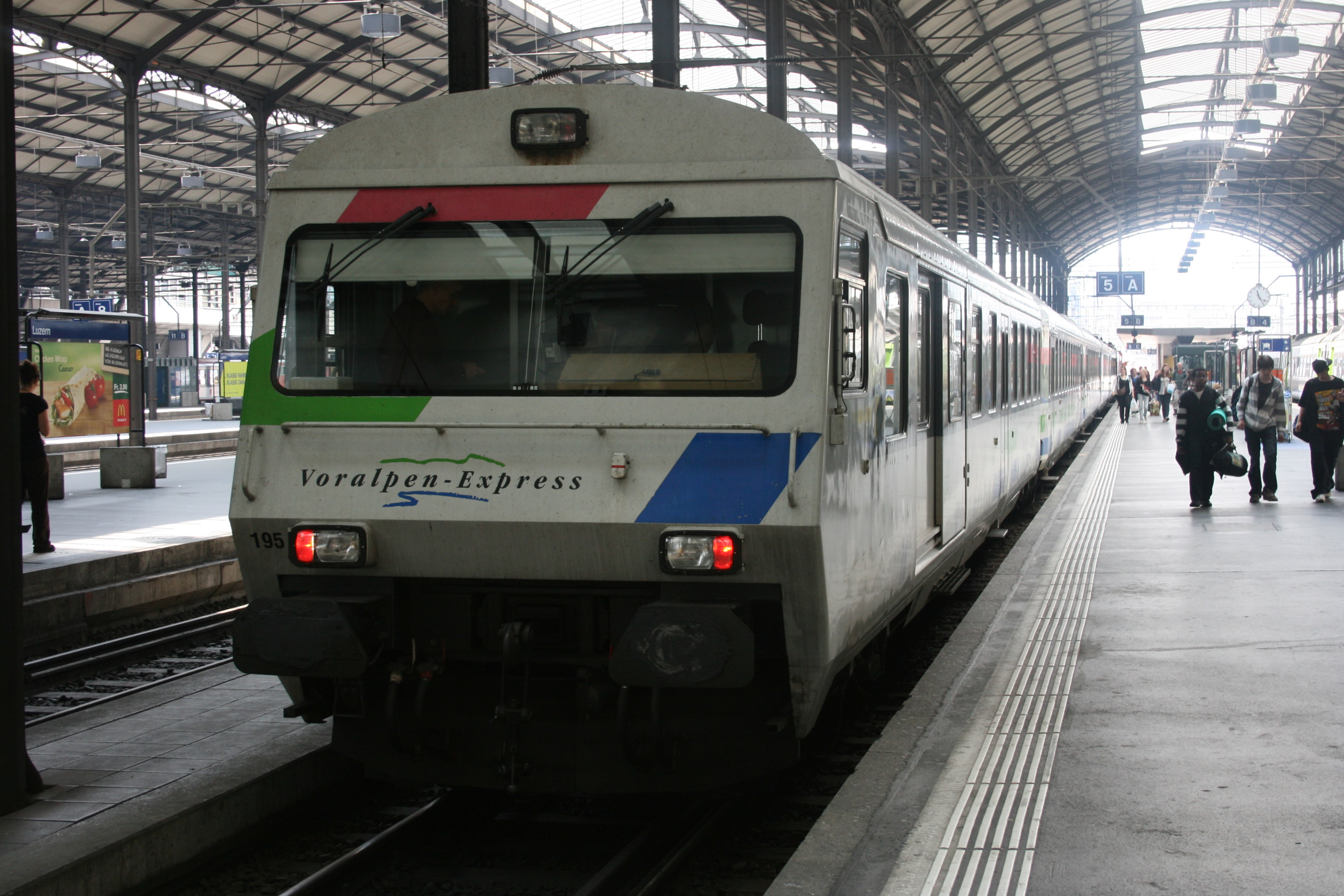 Voralpen Express in Luzern